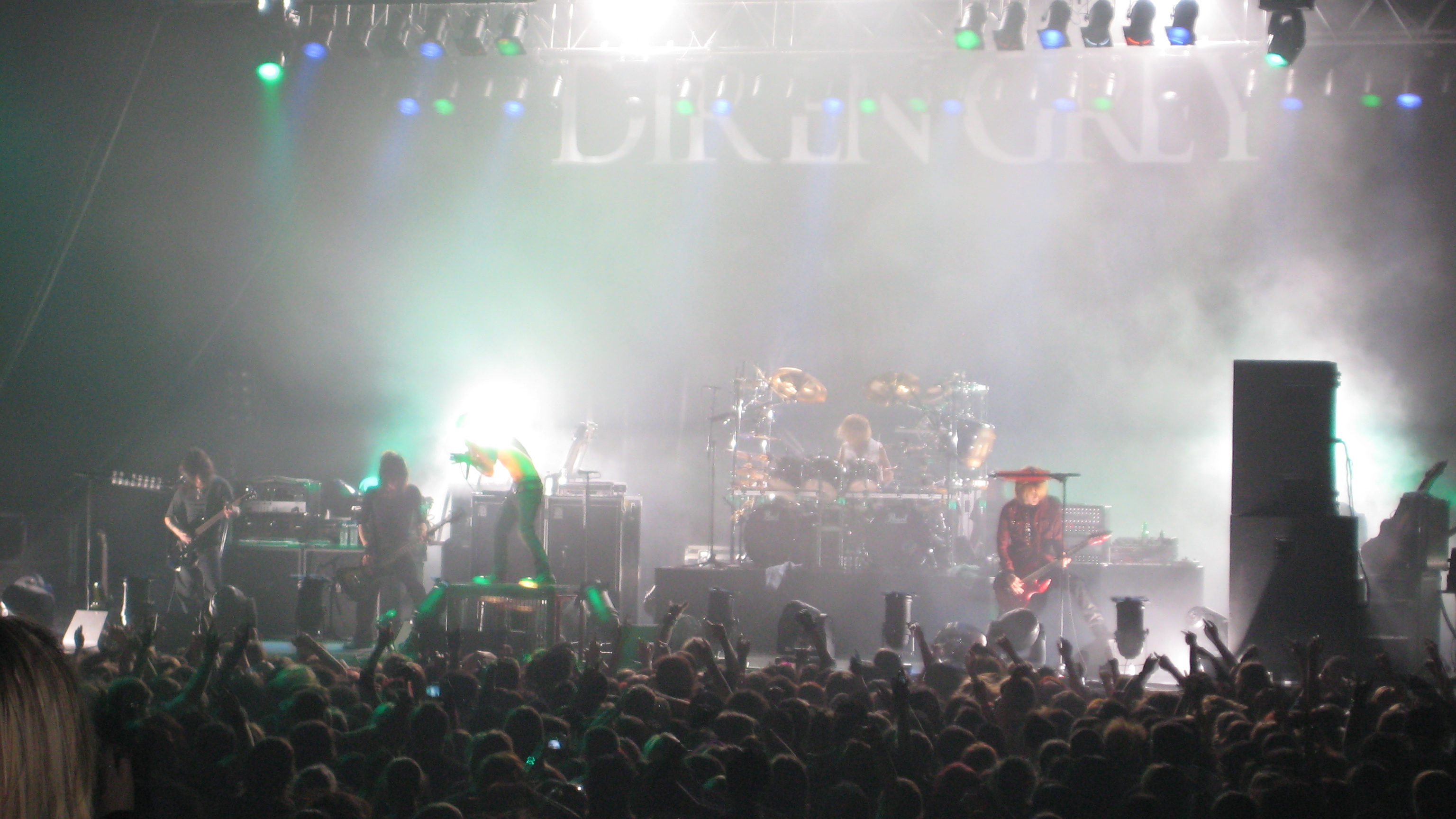 Auteur : Gorkab Nitrix Source : Concert de Dir en grey au Zénith de Paris 2007 Pris avec un Canon Digital IXUS 70